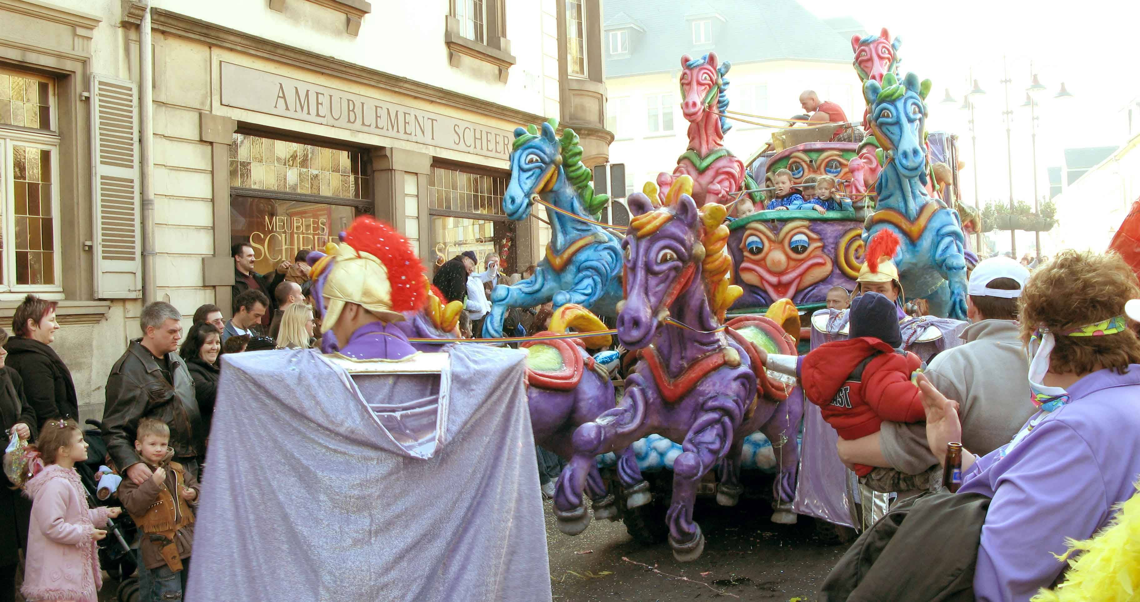 Sujet:Kavalkad Dikrech 2007 Source:Eege Foto vum User:Cornischong Licensing Kategorie:Dikrech